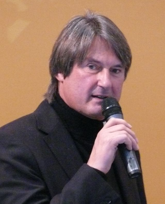 Hermann Tomczyk eigenes Bild Die angegebene Lizenz bezieht sich ausschließlich auf die schöpferische Leistung des Fotografen! Dies bedeutet bei einer lebenden Person etwa ein Veränderungsverbot und die Wahrung der entsprechenden Persönlichkeitsrechte.